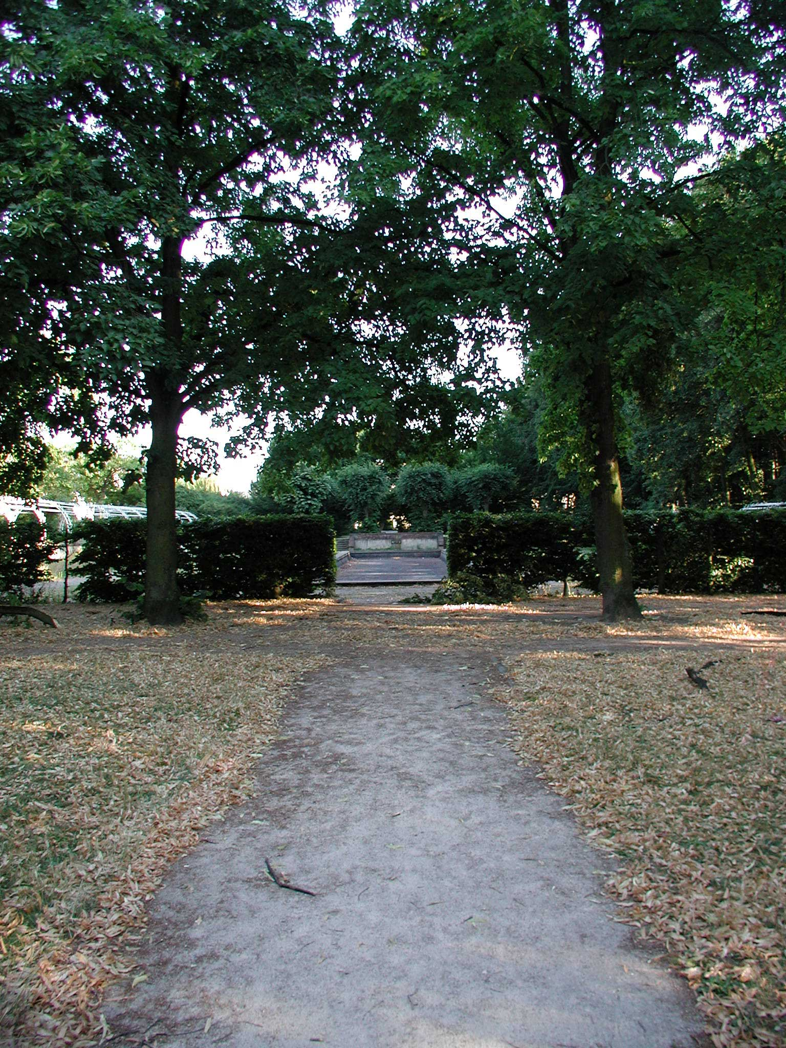 Grüngürtel-Köln-Vorgebirgspark